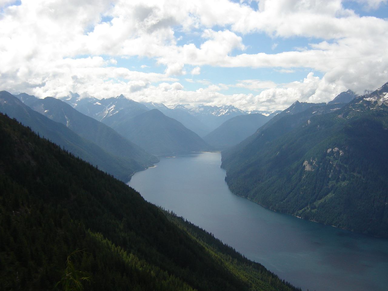 Chilliwack Lake, BC, Canada